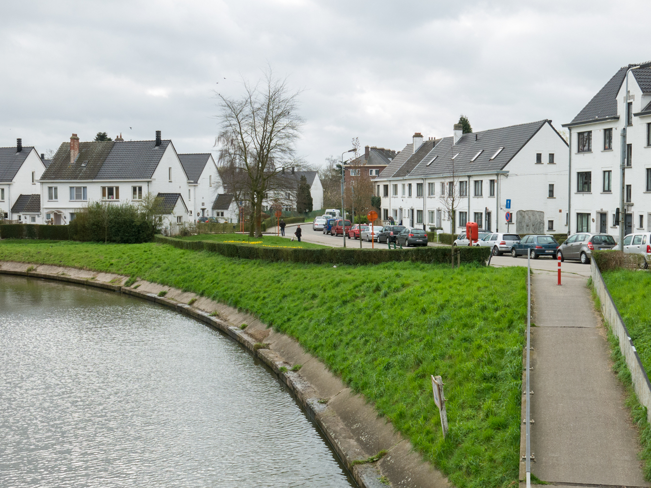 Malem